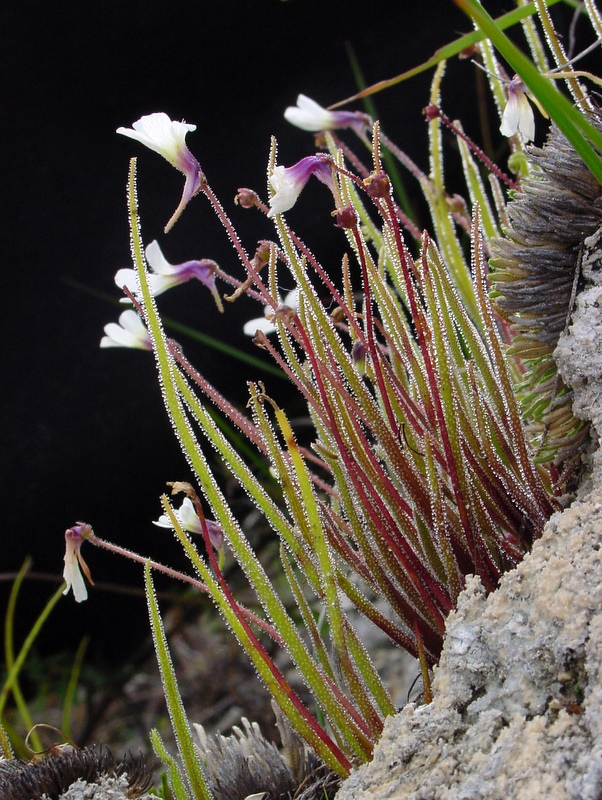 Pinguicula heterophylla in situ, Oaxaca, Mexico.